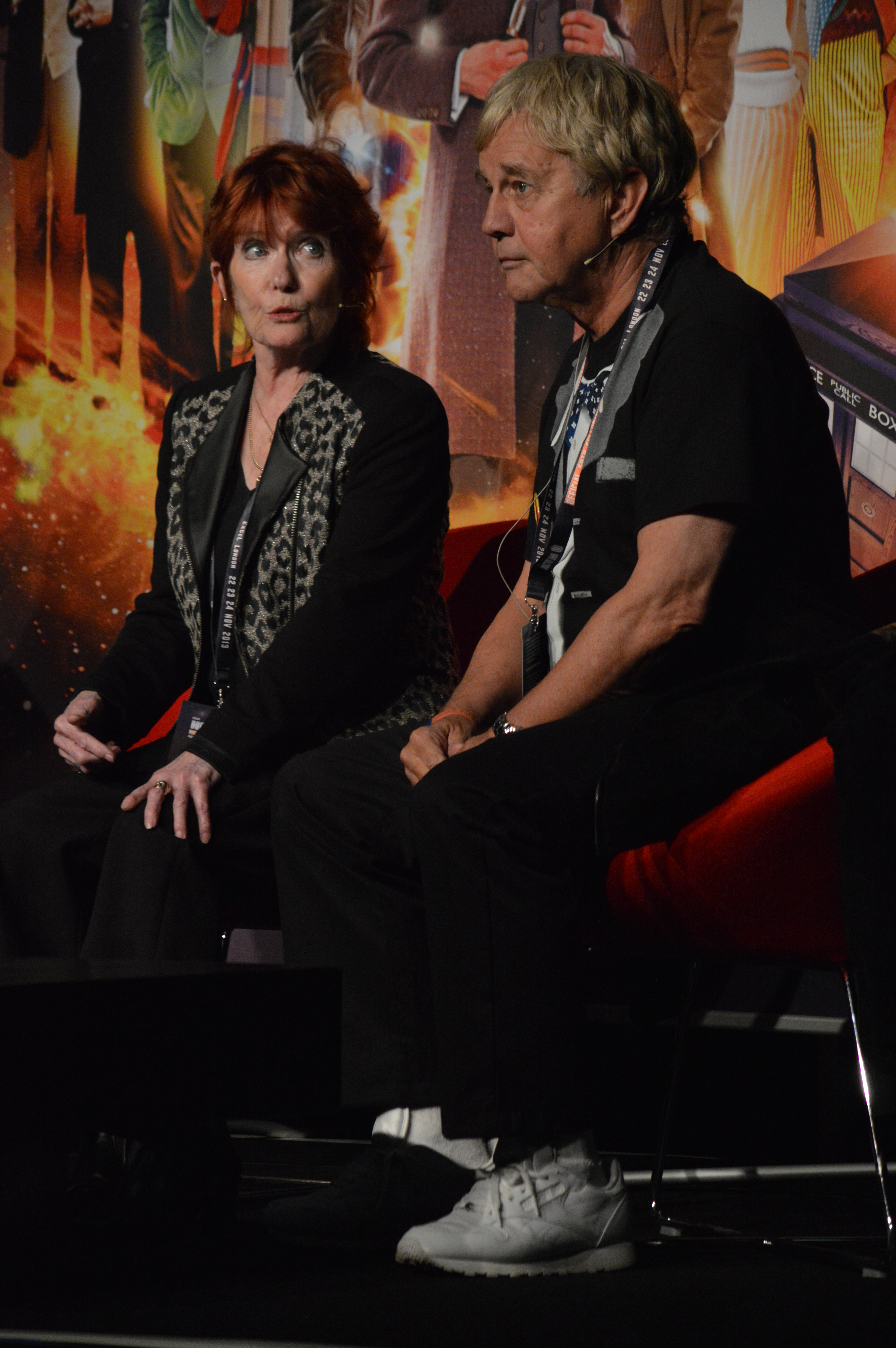 Jamie & Victoria Doctor Who Experience